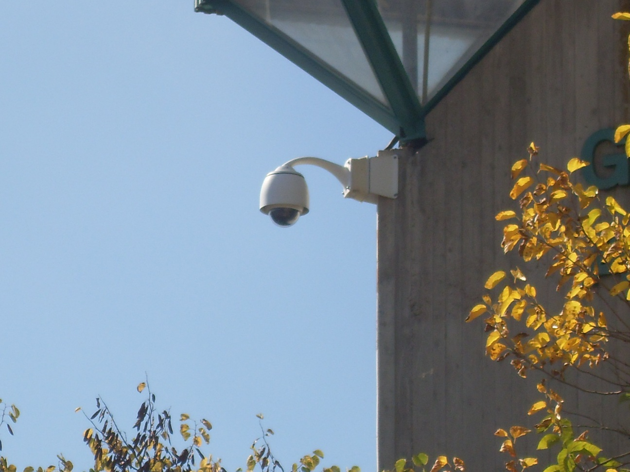 Caméra de vidéosurveillance à Villefontaine (Isère)